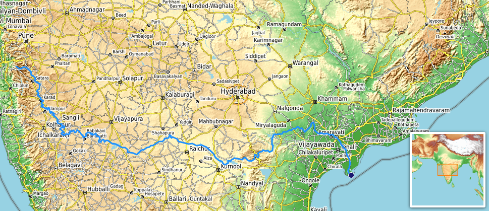 carte réalisée sur umap [1] This map may be incomplete, and may contain errors. Don't rely solely on it for navigation.